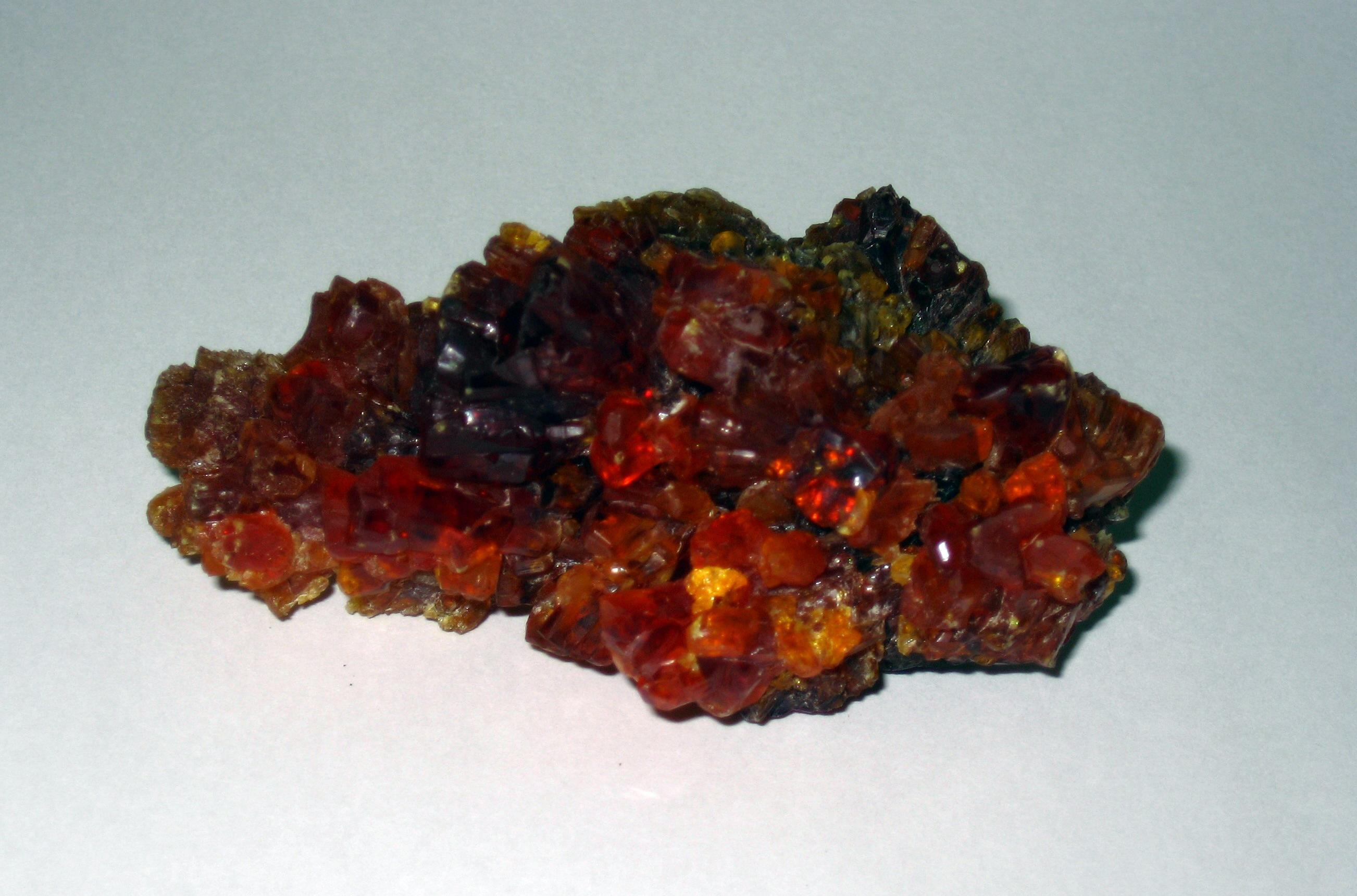 Sinkiitti / Zincite